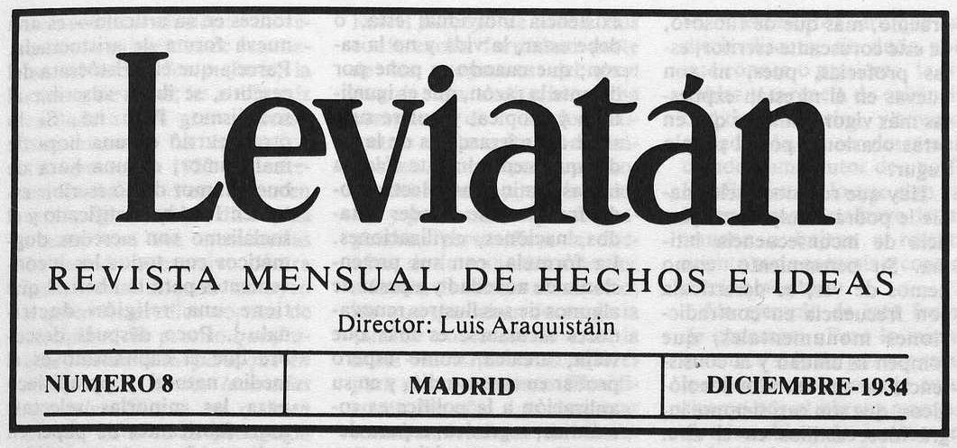 Cabecera de Leviatán (nº 8, diciembre 1934)